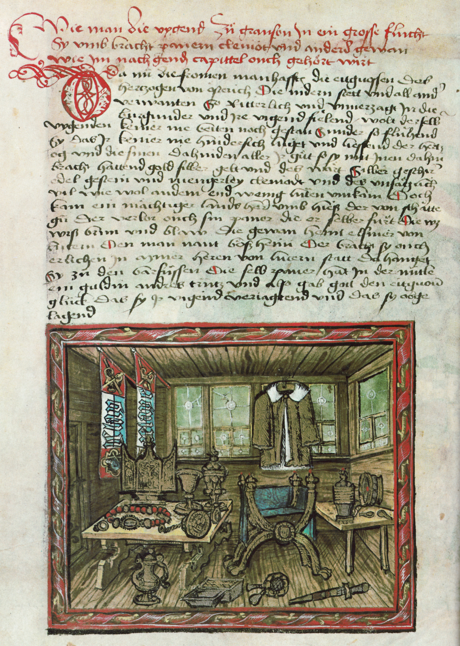 Darstellung Ausstellung der Burgunderbeute in Luzern nach der Schlacht bei Grandson 1476, in der Luzerner Chronik des Diebold Schilling, Folio 99v